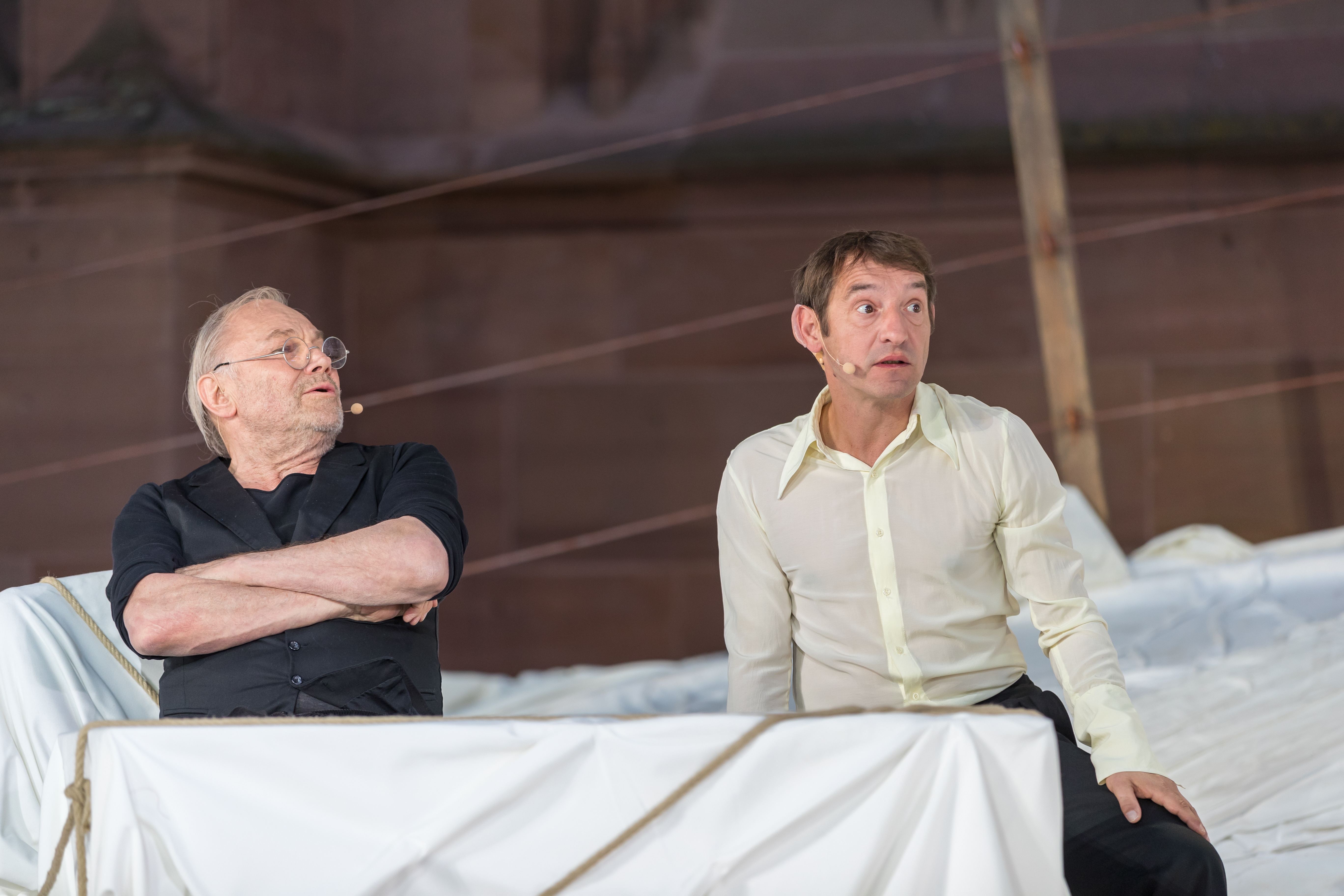 Boris Aljinovic, Klaus Maria Brandauer during Nibelungenfestspiele ( at Worms, Rheinland-Pfalz, Germany on 2019-07-10, Photo: Sven Mandel